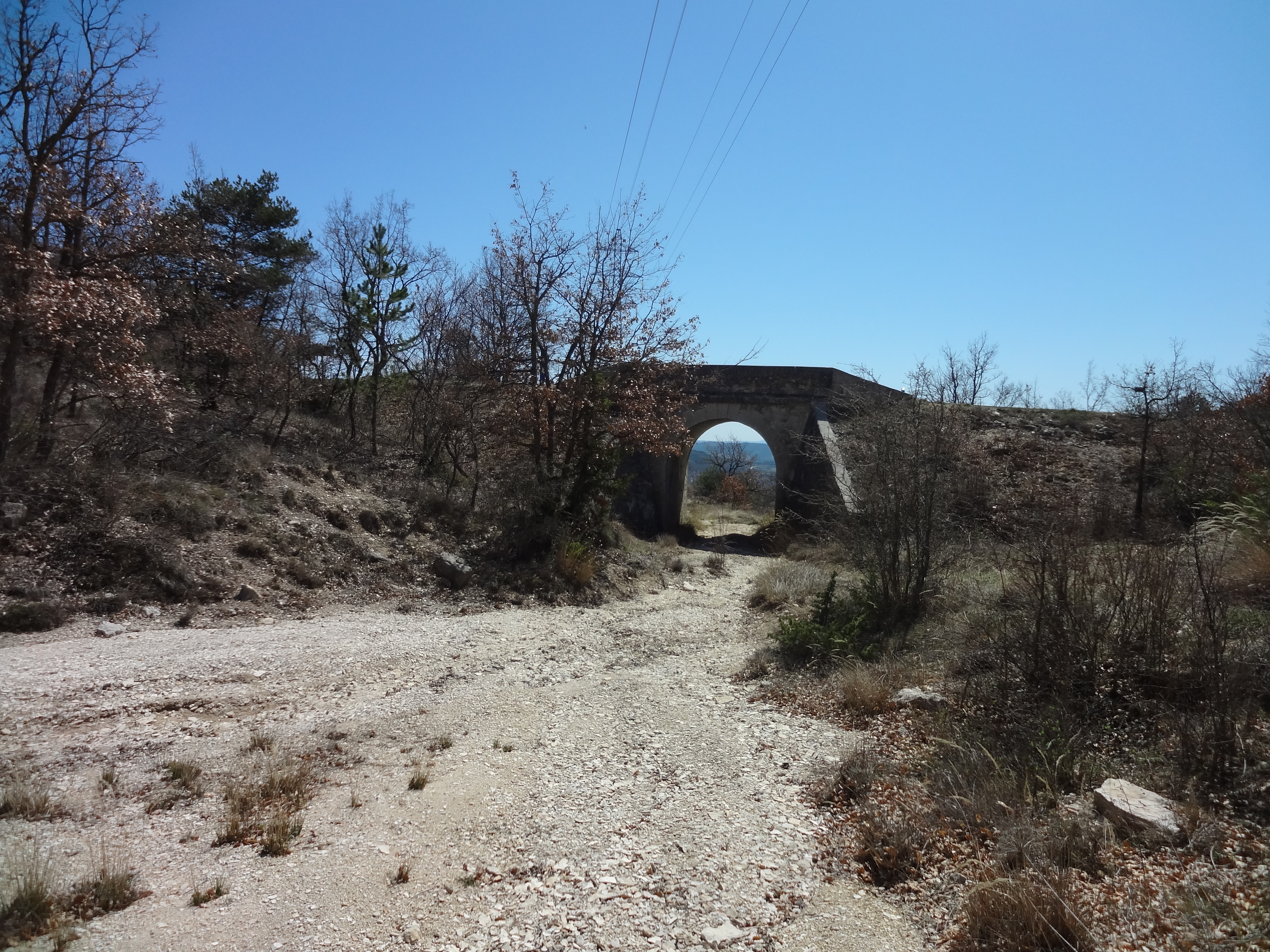 Pont de la route entre Fontienne et Forcalquier, franchissant le ravin des Aravanches, délimitant les deux communes. Construit en 1869